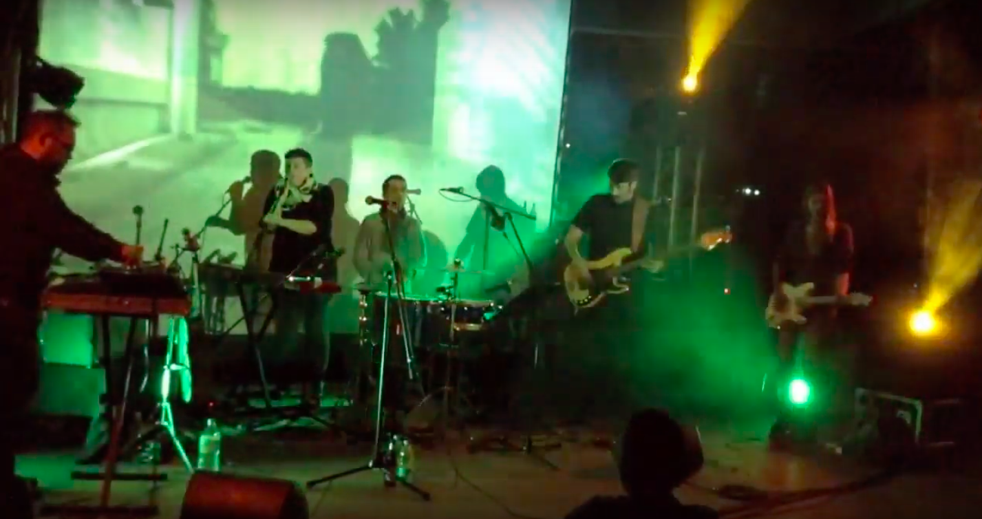 Anímic a #4Raons, el 2013.